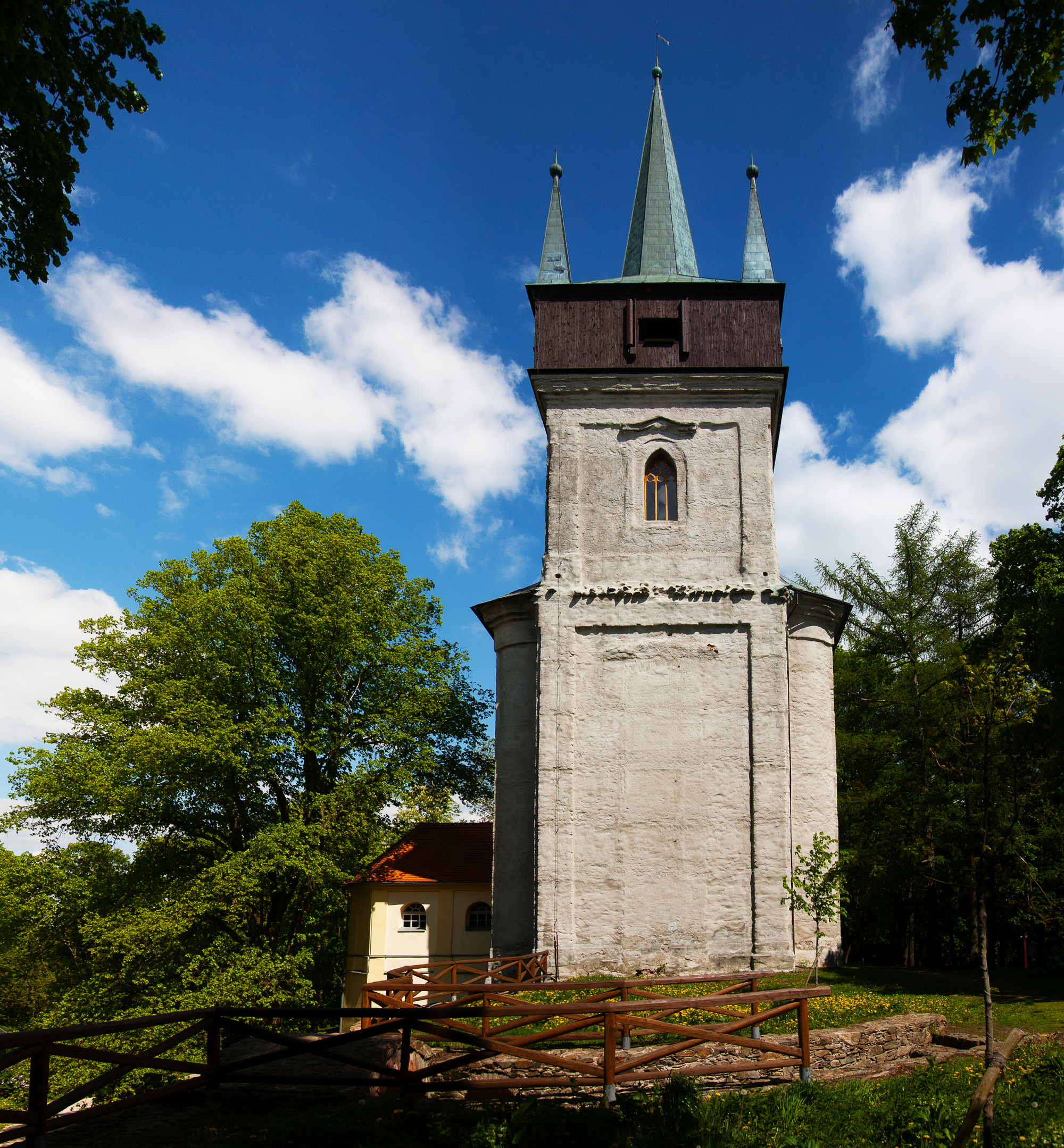 Věž bývalého kostela svatého Wolfganga, Bolfánek, na kopci nad zámkem Lázeň, Chudenice.